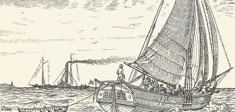 Postsmakke omkring 1830, Radering fra 1800-tallet